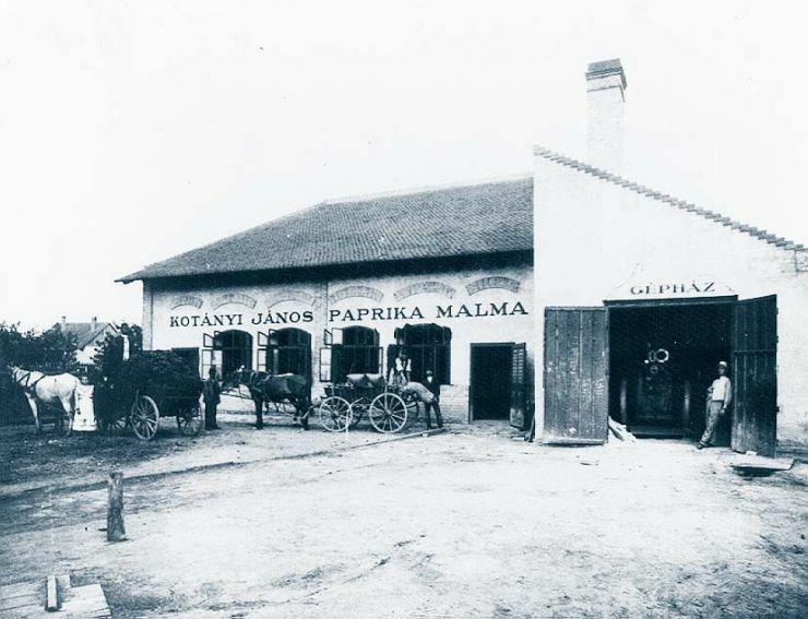 Kotányi János Paprika malmának épülete Szegeden. 1881-ben kezdte működését